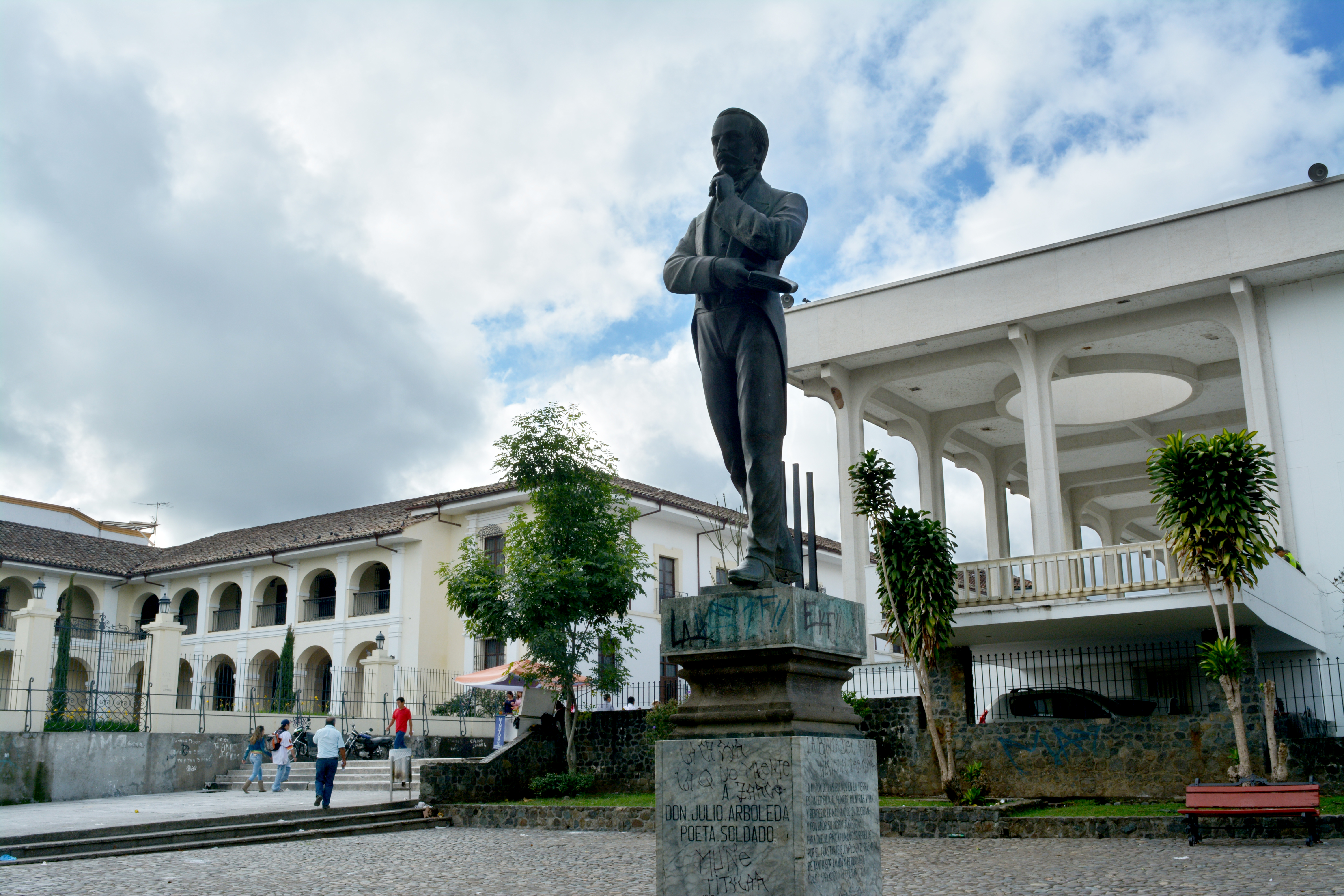 Poeta y soldado Julio Arboleda Esta fotografía fue tomada en el municipio colombiano con código 19001.